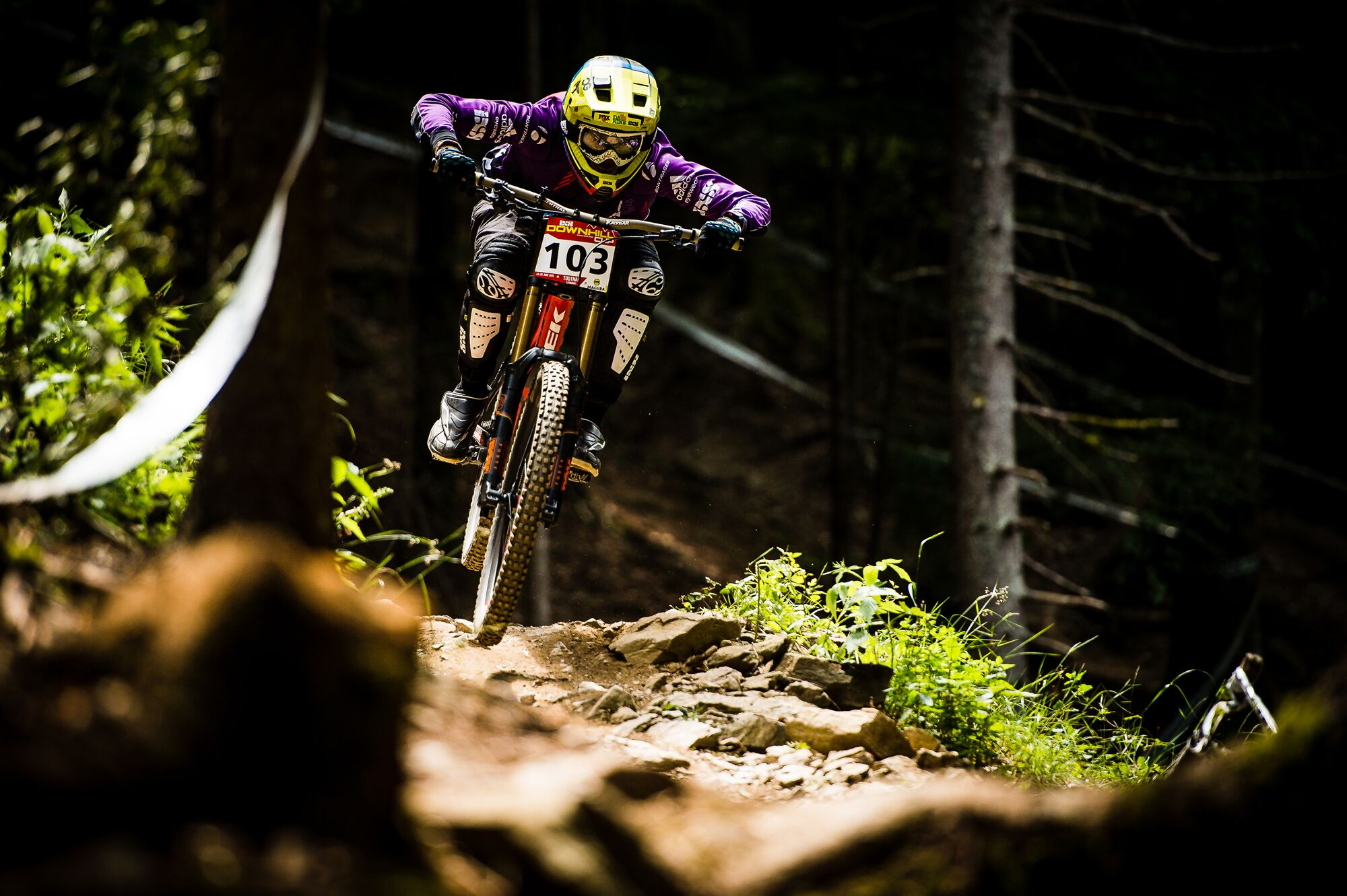 Steffi Marth, deutsche Radsportlerin, bei den Deutschen Downhill-Meisterschaften 2015